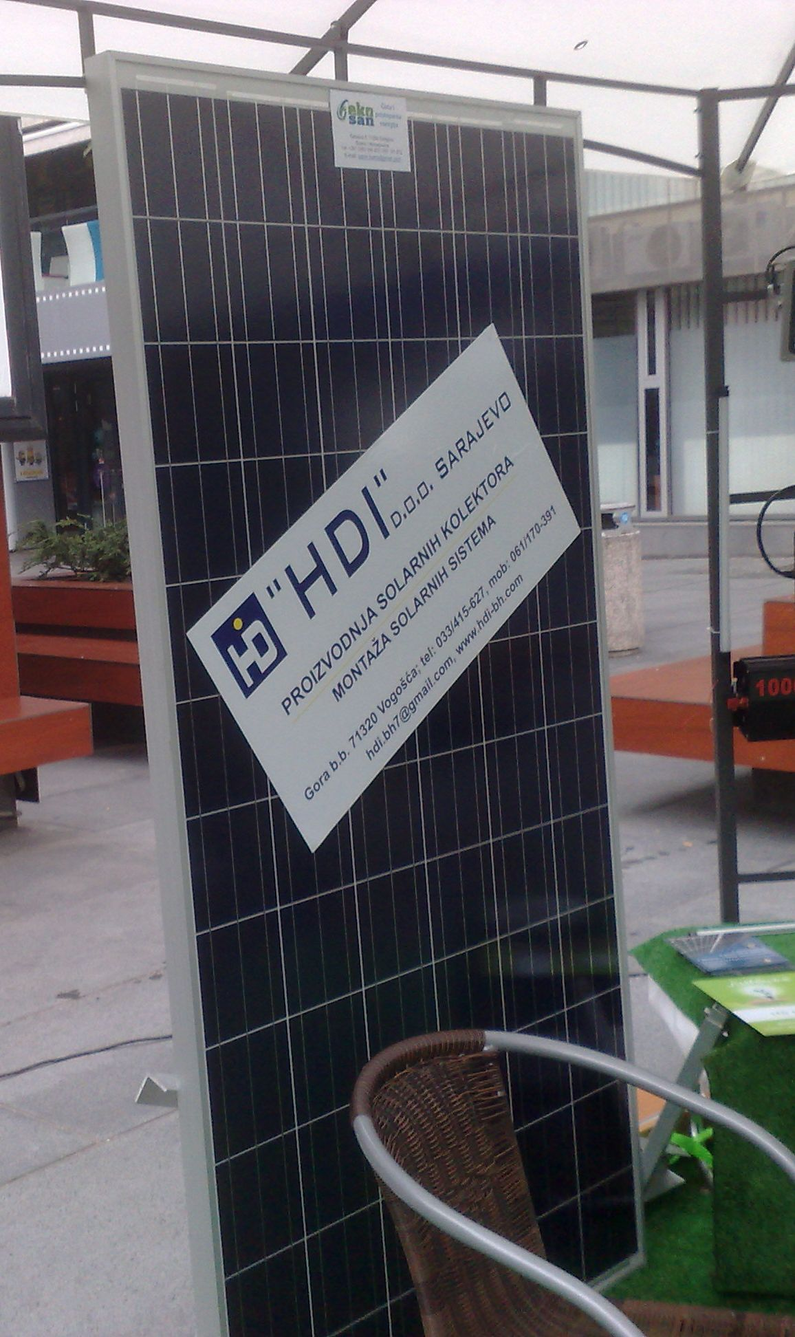 Solarni kolektor